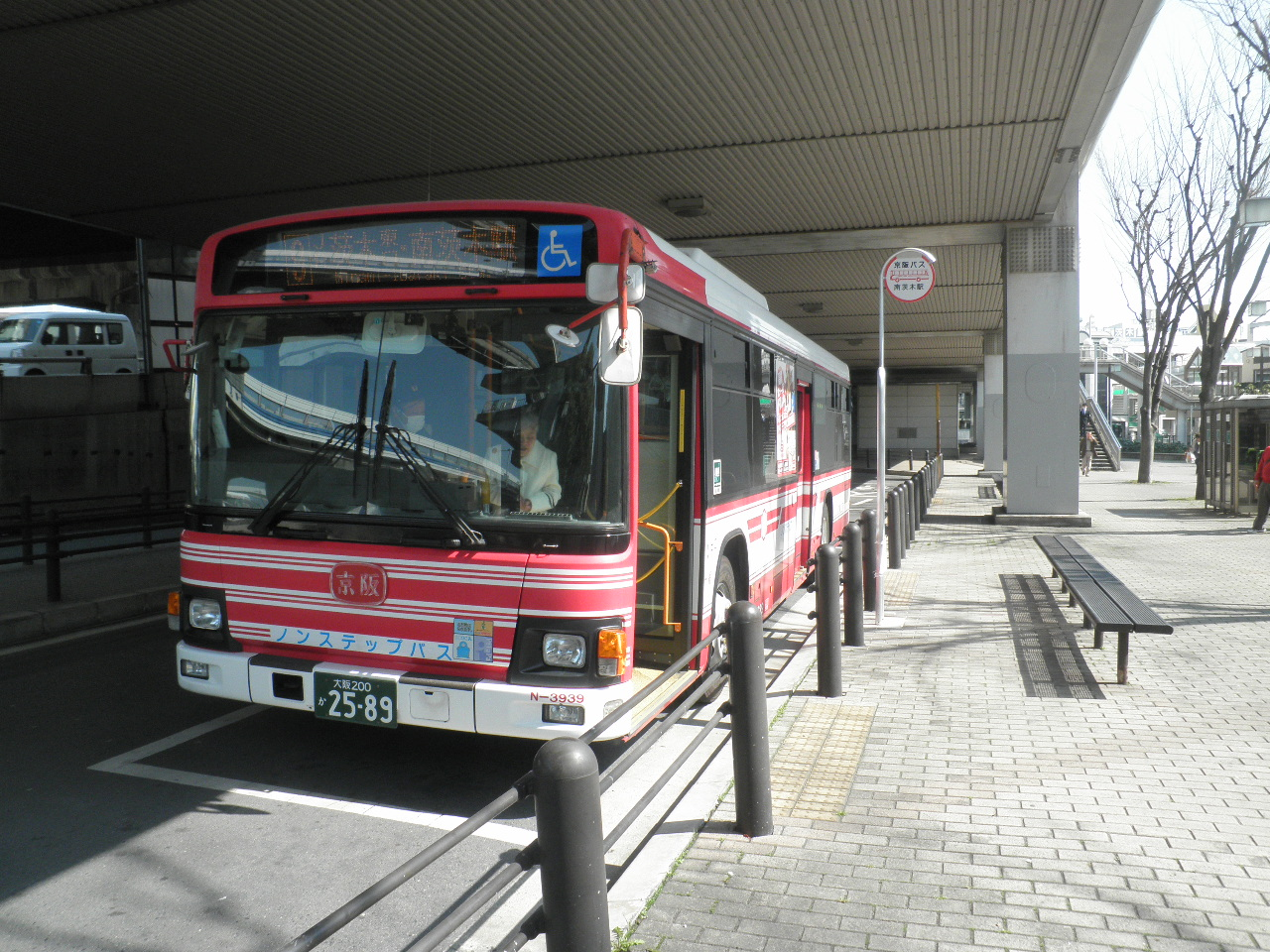 南茨木駅前に到着した9系統